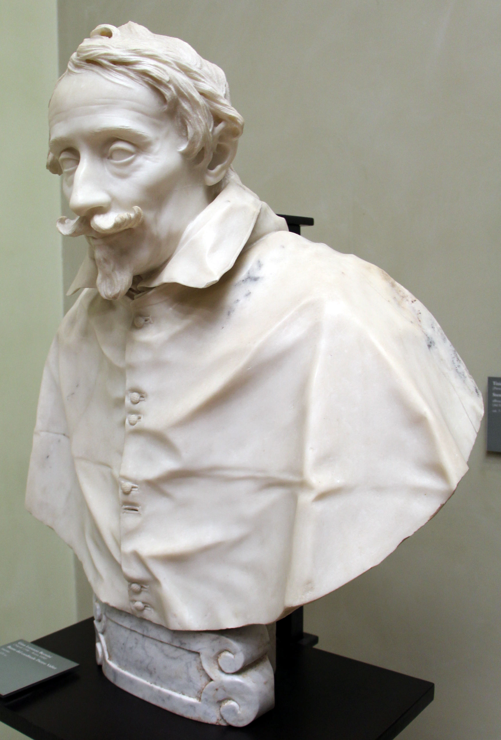 Galleria G. Franchetti alla Ca' d'Oro - MIBAC The making of this document was supported by Wikimedia CH. (Submit your project!) For all the files concerned, please see the category Supported by Wikimedia CH. This is a photo of a monument which is part of cultural heritage of Italy.